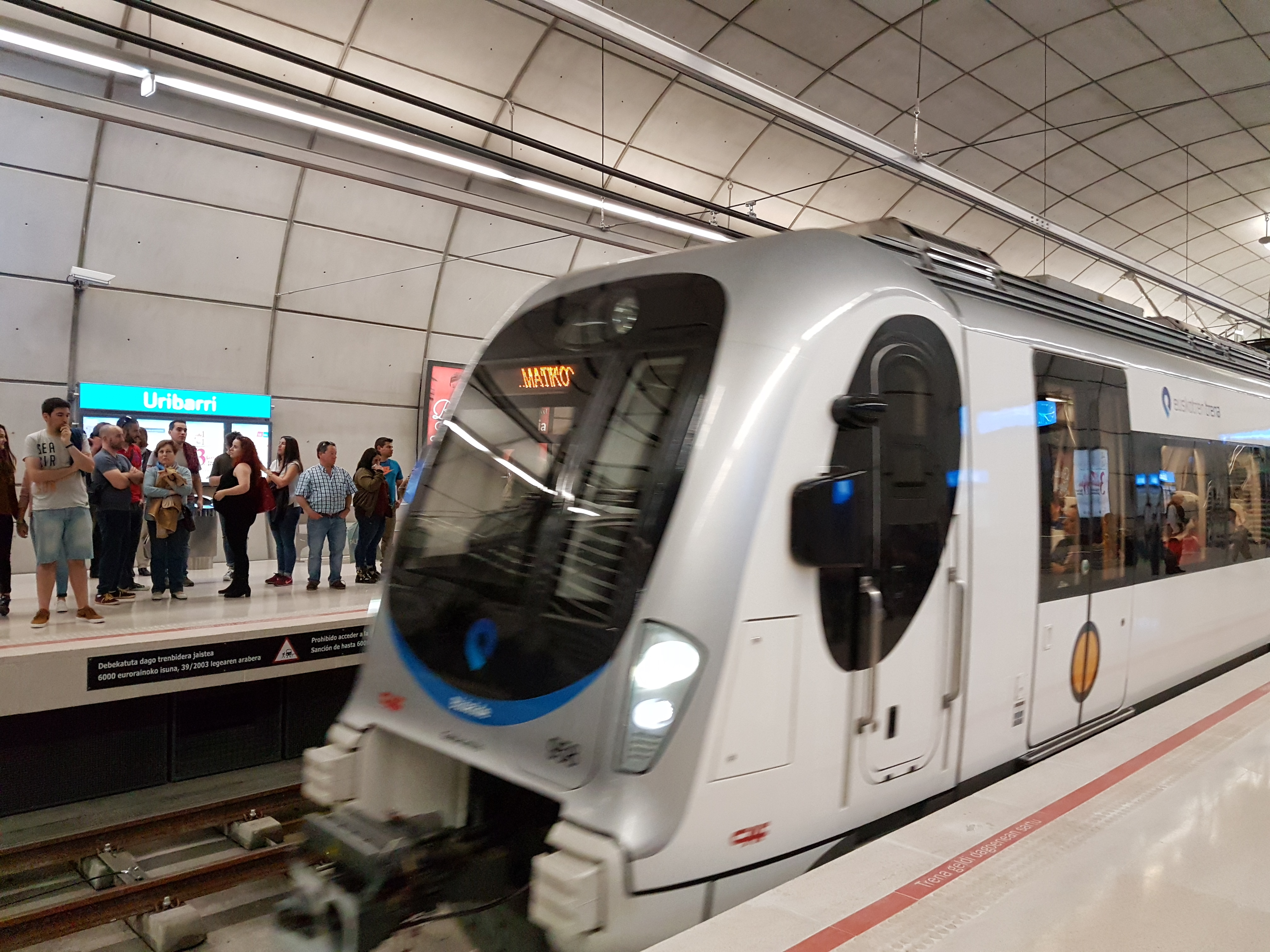 Estación de Uribarri.